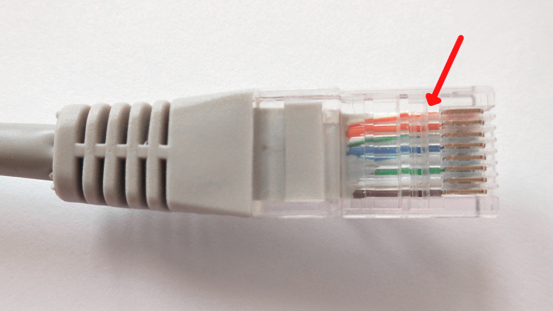 Pach-Kabel Stecker amerikanische Norm mit Pfeil zu den unterscheidenden orangen Drähten